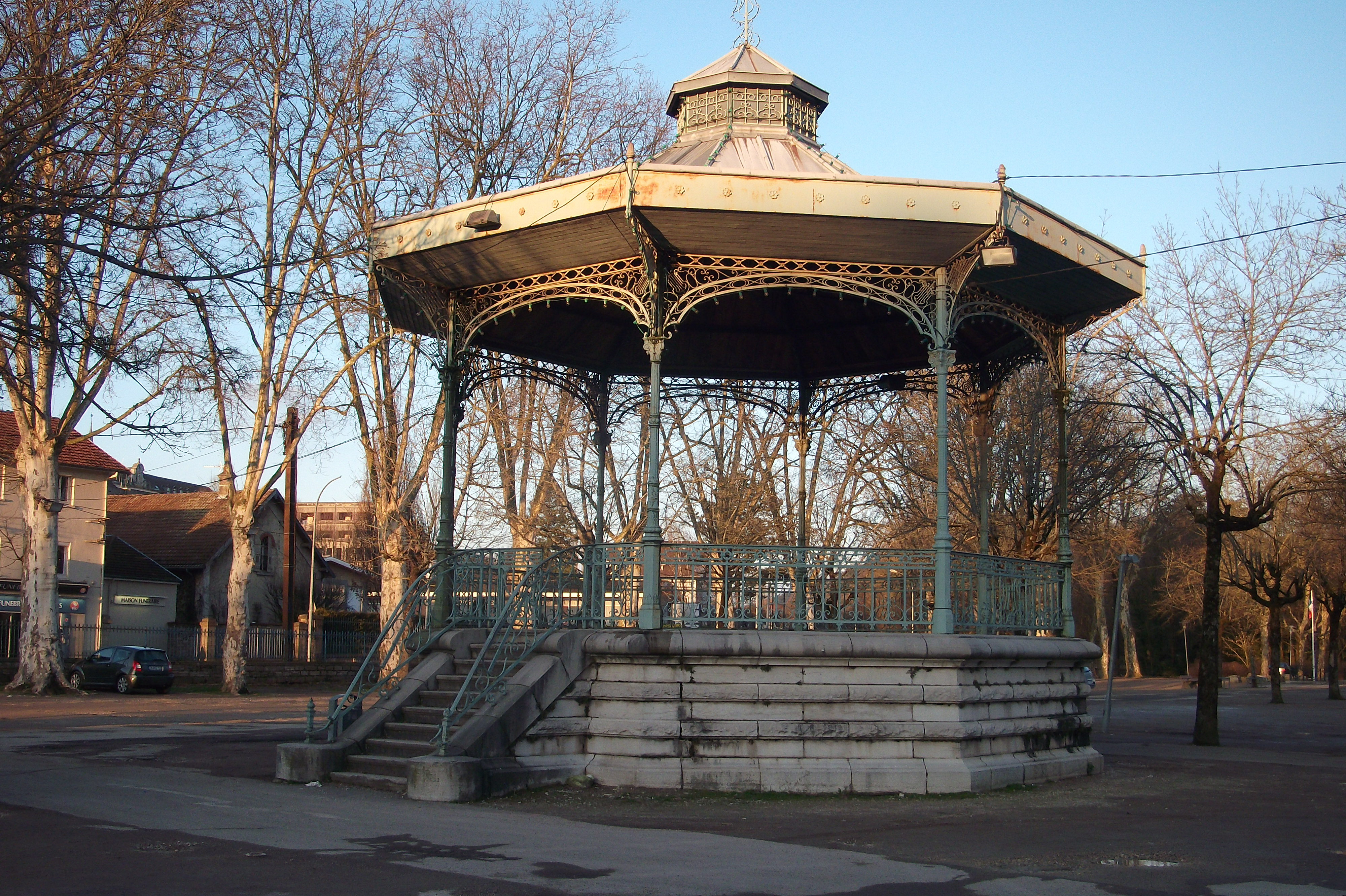 Le kiosque de la place des Allées à Vesoul